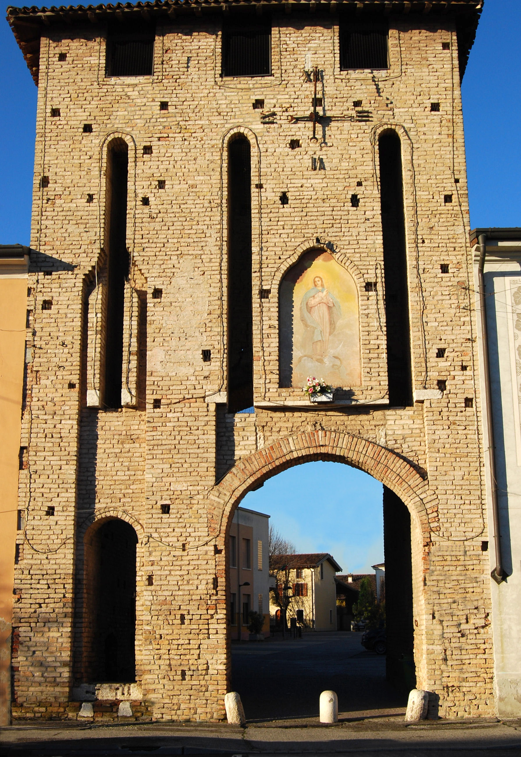 Remedello Sopra, il castello.